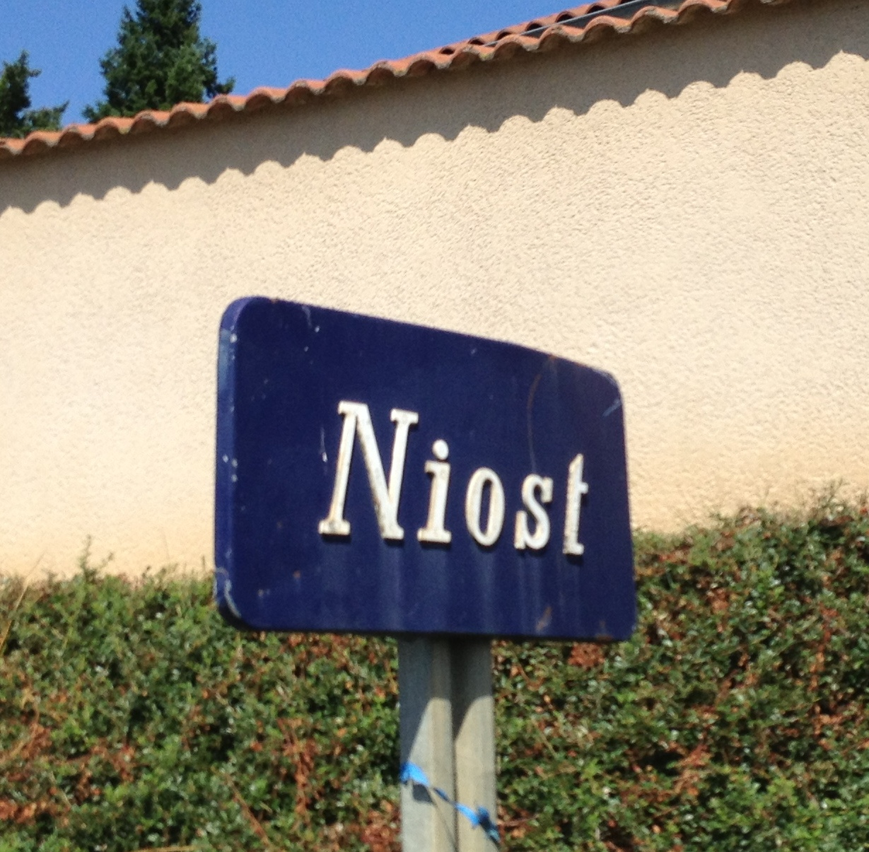 Panneau du hameau de Niost à Saint-Jean-de-Niost.